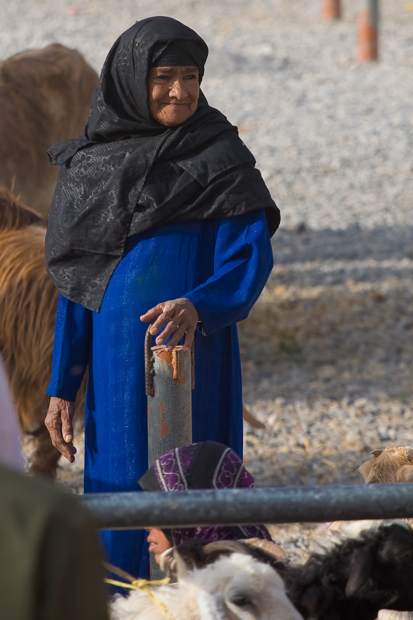 Woman at Nizwa goat market